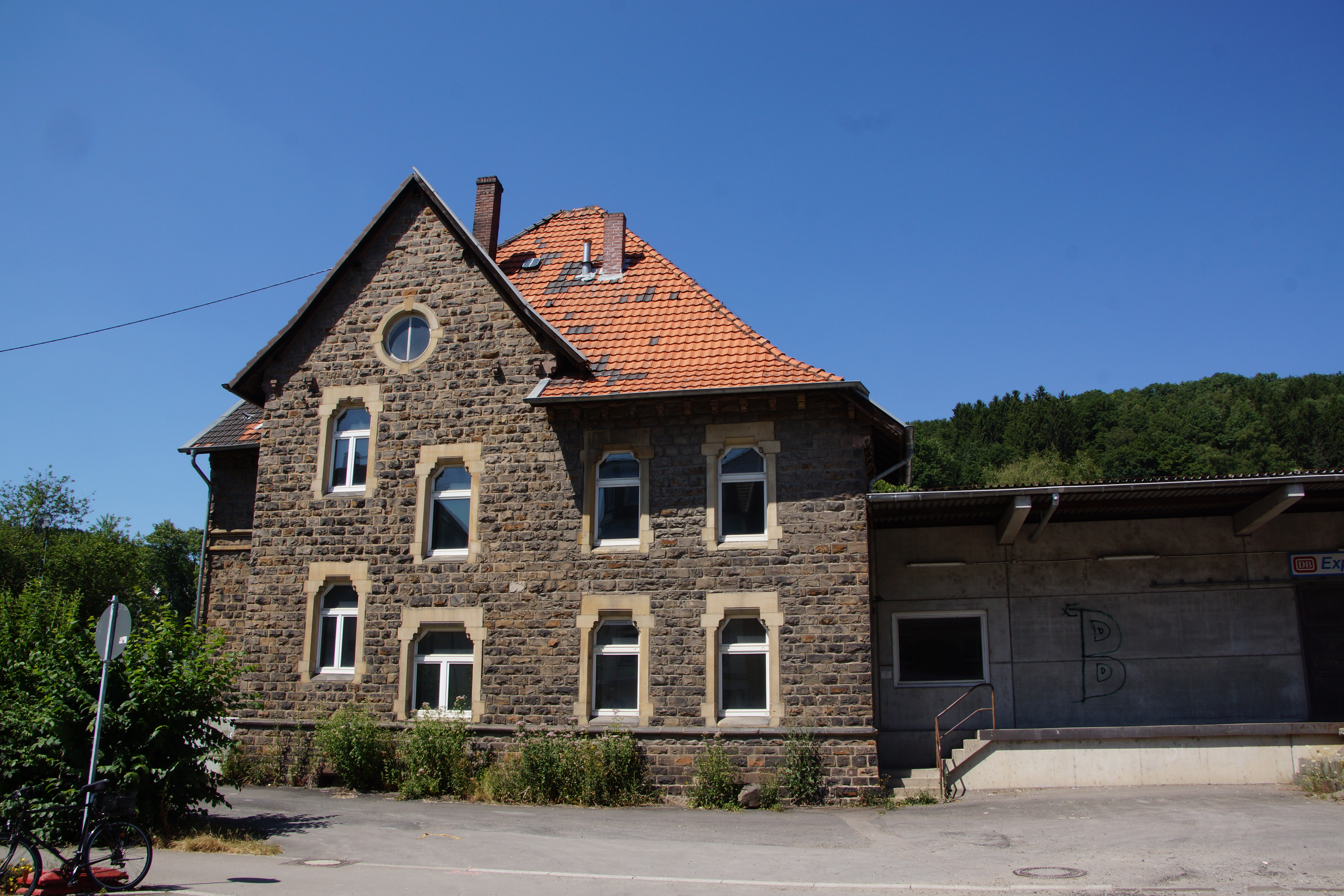 Erster Bahnhof Dieringhausen mit Güterabfertigung (neben dem Eisenbahnmuseum)